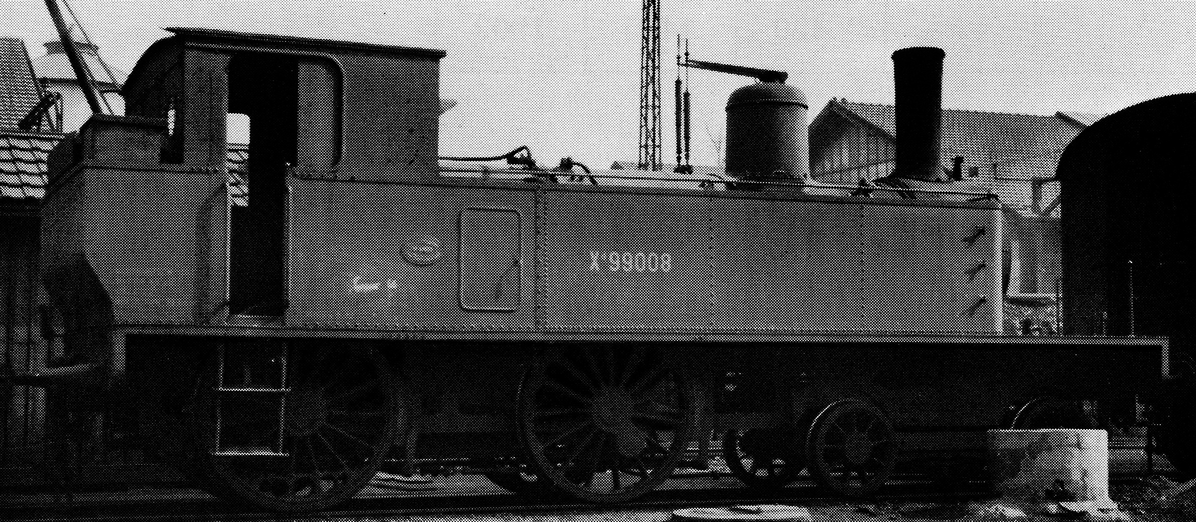 Heizwagen Xd 99008 der Schweizeriſchen Bundesbahnen, 1927 umgebaut aus Locomotive Eb 2/4 Nr. 5484, bis 1902 A2 Nr. 149 der Schweizeriſchen Centralbahn, gebaut 1893 zů Grafenſtaden von der Elſäſſiſchen Maſchinenbau-Geſellſchaft (Fabr.-Nr. 4507); 1935 abgebrochen.